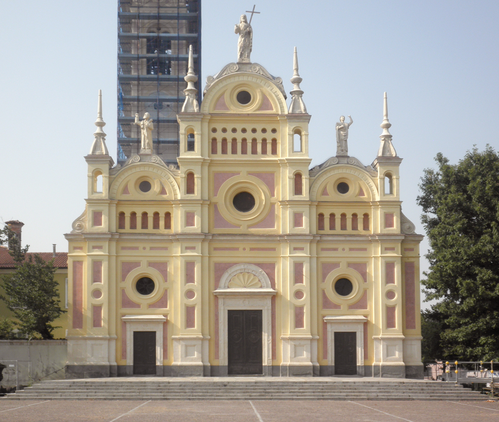 La chiesa parrocchiale dei SS. Nazario e Celso a Sesto Cremonese, fraz. di Sesto ed Uniti